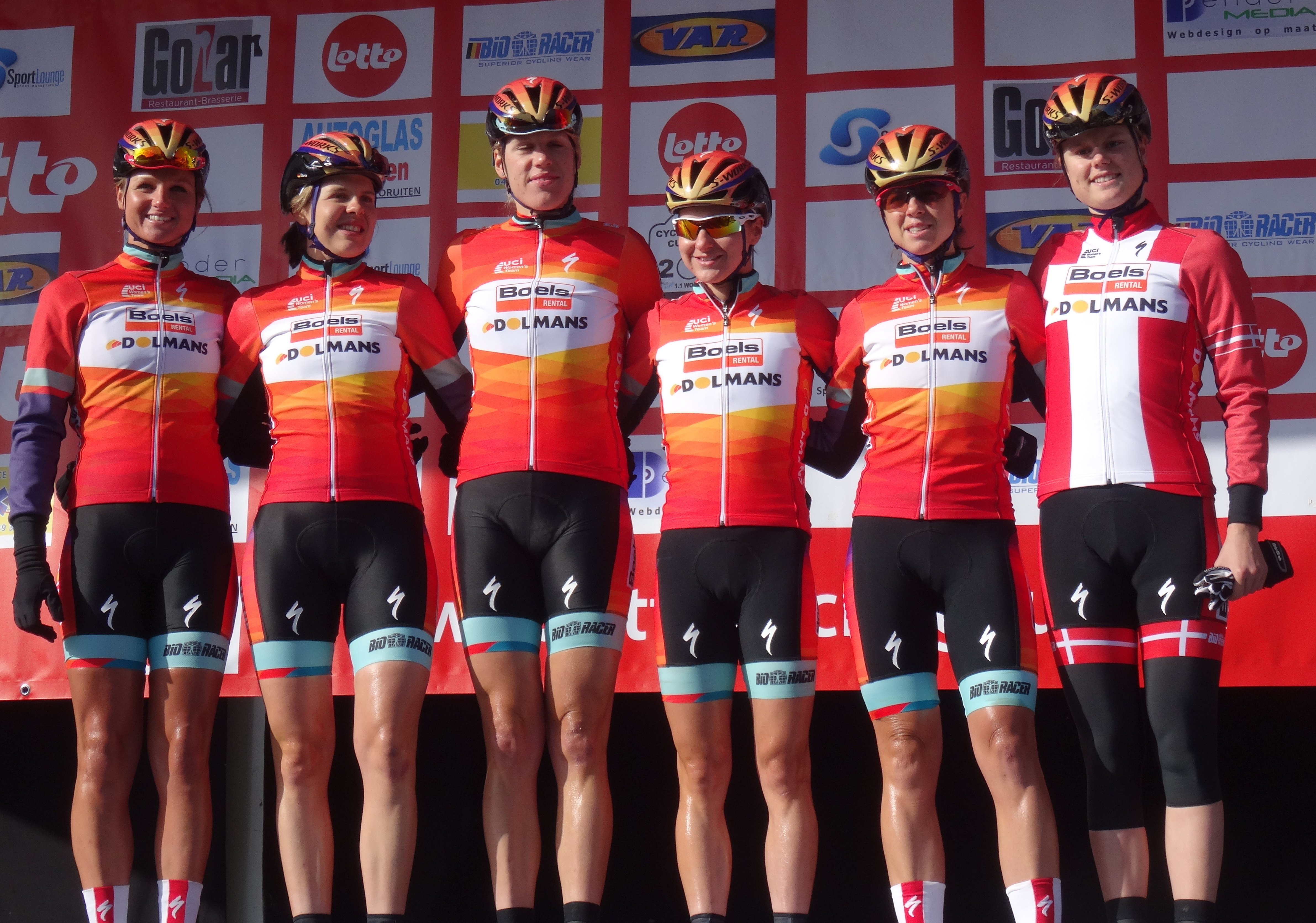 Reportage réalisé le mercredi 4 mars à l'occasion du départ du Samyn des Dames 2015 et du Samyn 2015 à Quaregnon, Belgique.